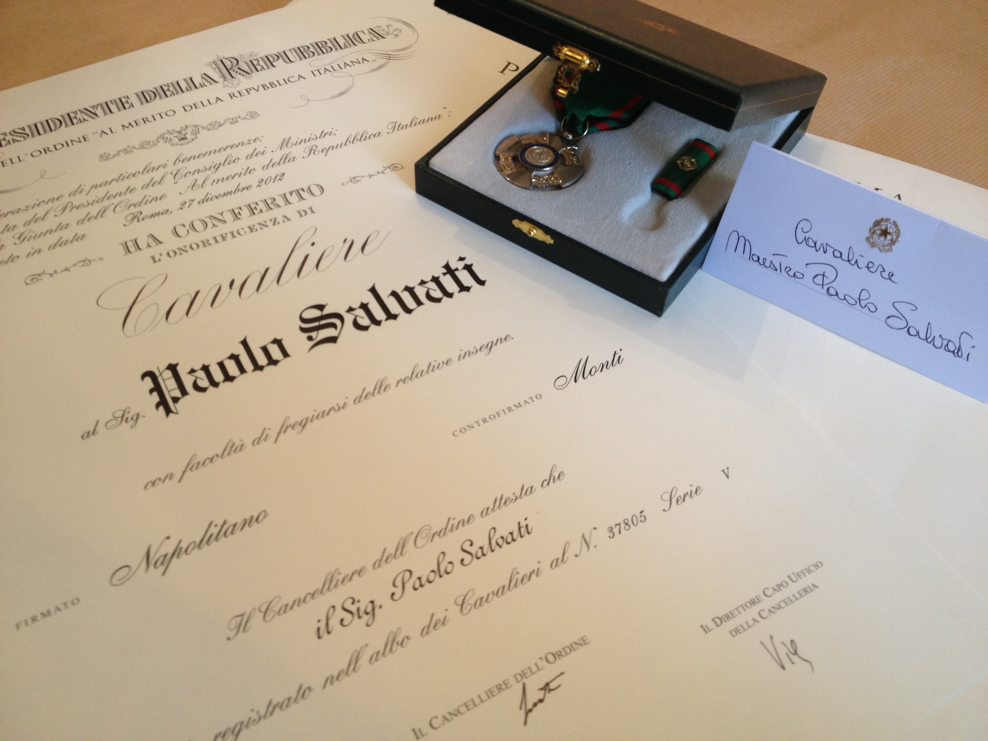 Paolo Salvati, Roma, 22 febbraio 1939 - Roma, 24 giugno 2014. Maestro pittore espressionista Italiano, ritrattista, liutaio, restauratore. Eccelle tramite l’arte della pittura e trova il riscatto lirico all’invadenza razionalistica scientifica, libero da formalismi accademici dipinge soggetti inventati, usa tecniche olio su tela, tempera, pastello. Dipinge la Pietra Blu olio su tela, 1973 - 1974, raffigurante una grande pietra centrale di colore blu, nel quadro un messaggio intenso, obbligato, sintetizza il percorso di tutti in una pietra da superare, il peso dell’esistenza. Eugenio Montale nel 1973 scrive “La poesia non ha un momento in cui nasce ma è li da sempre come una pietra”. Cerca, trova, dipinge la Poesia anche in altri soggetti, Sogni di Primavera d’Alta Montagna olio su tela 1974 e d’Estate 1975, le tele Alberi Blu dal 1968 al 2011. Seguirono altri dipinti con la stessa intensità espressiva, la Montagna Gialla 1991, una serie intitolata Fronde Rosse olio su tela, Settembre 1980, Fronde Rosse 1993, 1994, Bosco su Fronde Rosse 1999, numerosi paesaggi inventati, marine, ritratti. Il 13 dicembre 2005,è riconosciuto Cittadino Illustre per meriti artistici, delibera 1103 su bollettino ufficiale 30 gennaio 2006. Il 27 dicembre 2012 su proposta della Presidenza del Consiglio dei Ministri è insignito per meriti artistici del grado di Cavaliere dell’Ordine al Merito della Repubblica Italiana.